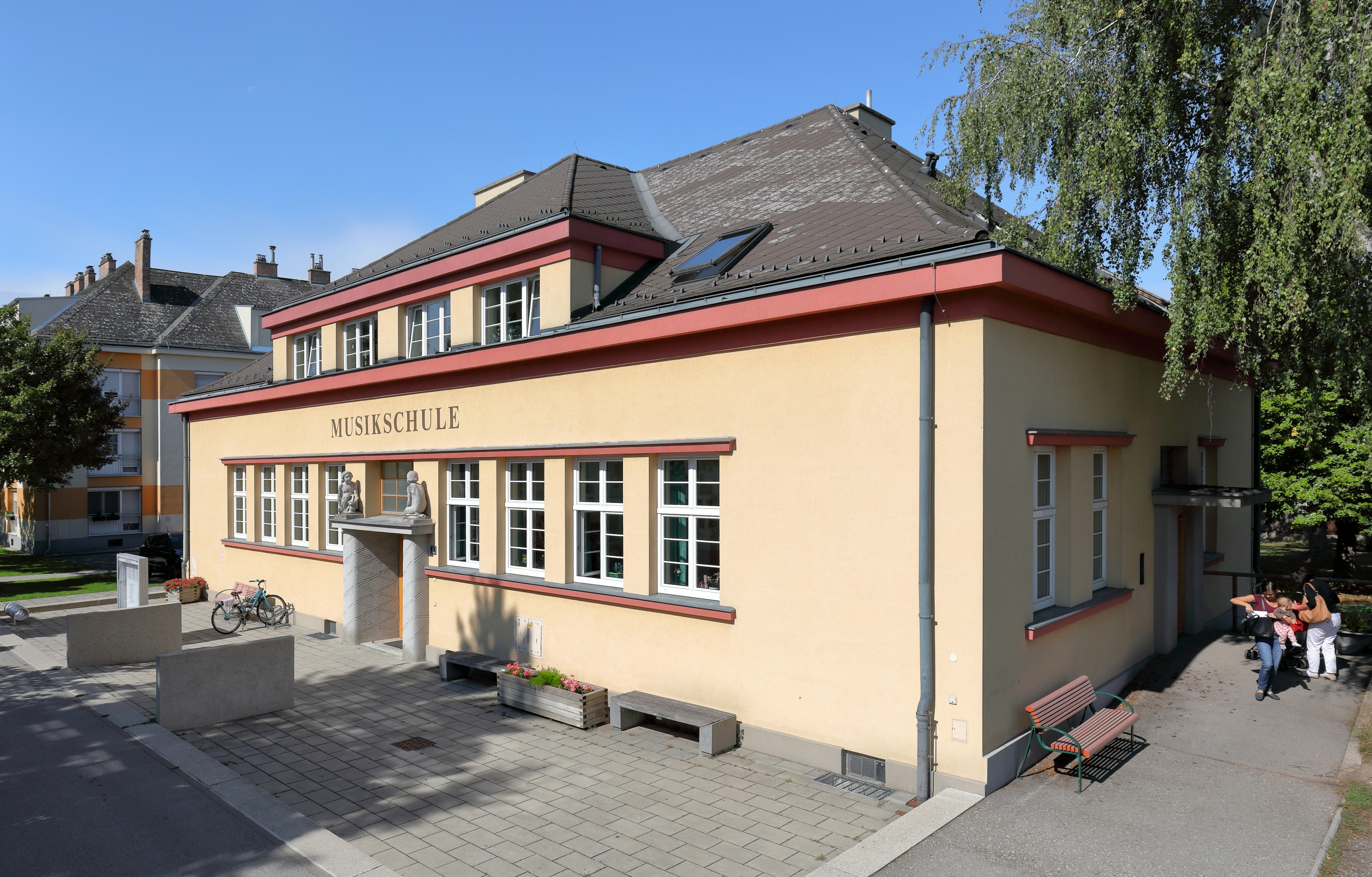 Südostansicht der Musikschule in der niederösterreichischen Stadt Deutsch-Wagram. Als Kindergarten 1928 errichtet und um 1999/2000 zu einer Musikschule umgebaut. Über dem vorgezogenen Steinportal befinden sich die Skulpturen zweier spielender Kinder.